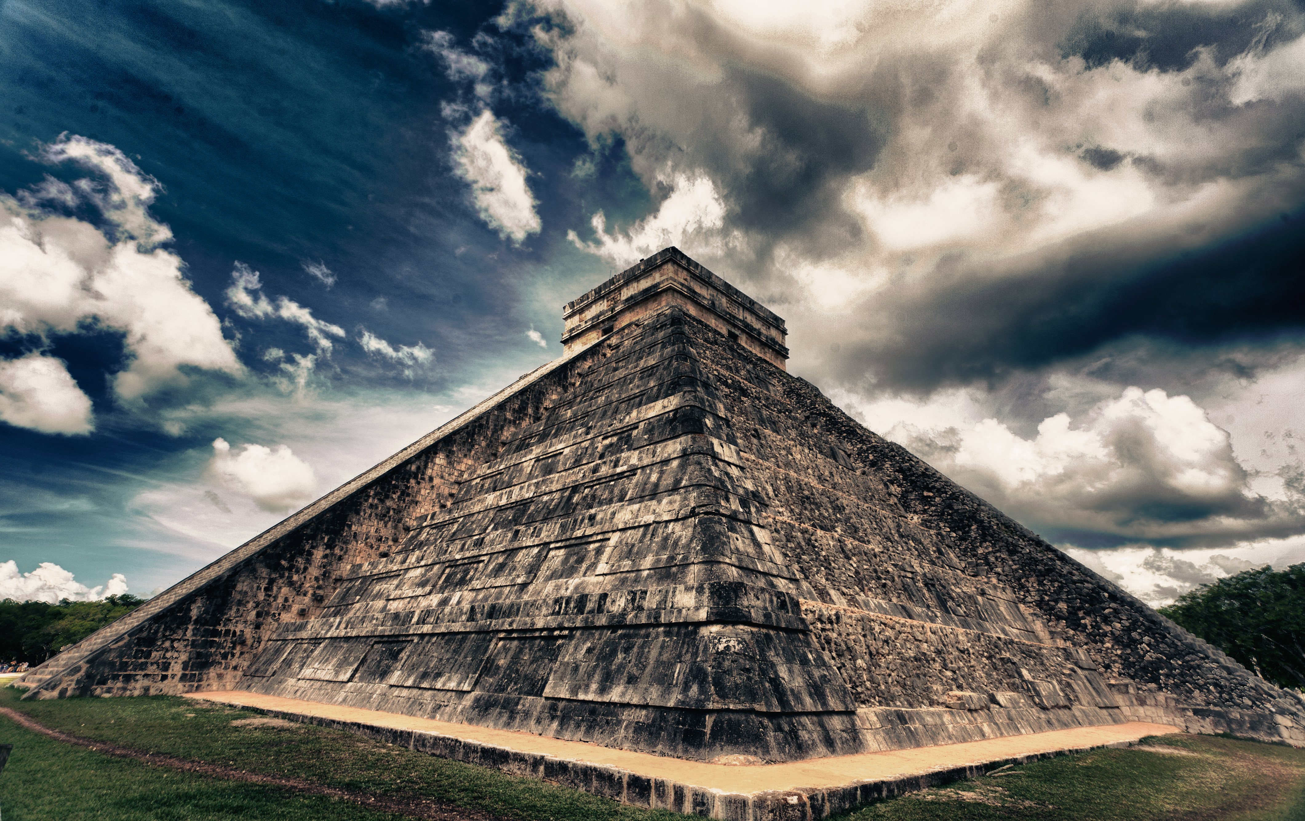 El Castillo in Chichén Itzá, eine der bedeutendsten Maya Ruinenstätte in Mexiko.